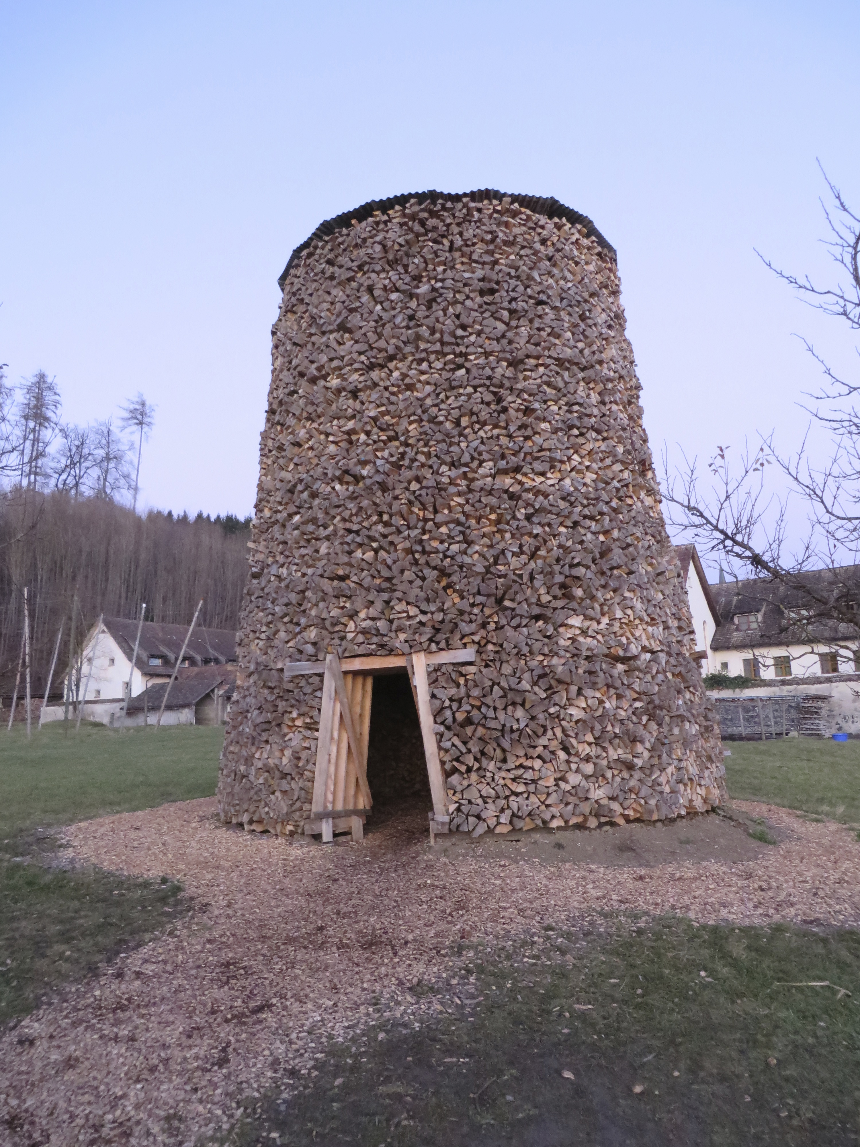 Scheiterturm von Tadashi Kawamata; installiert März 2013– Oktober 2015